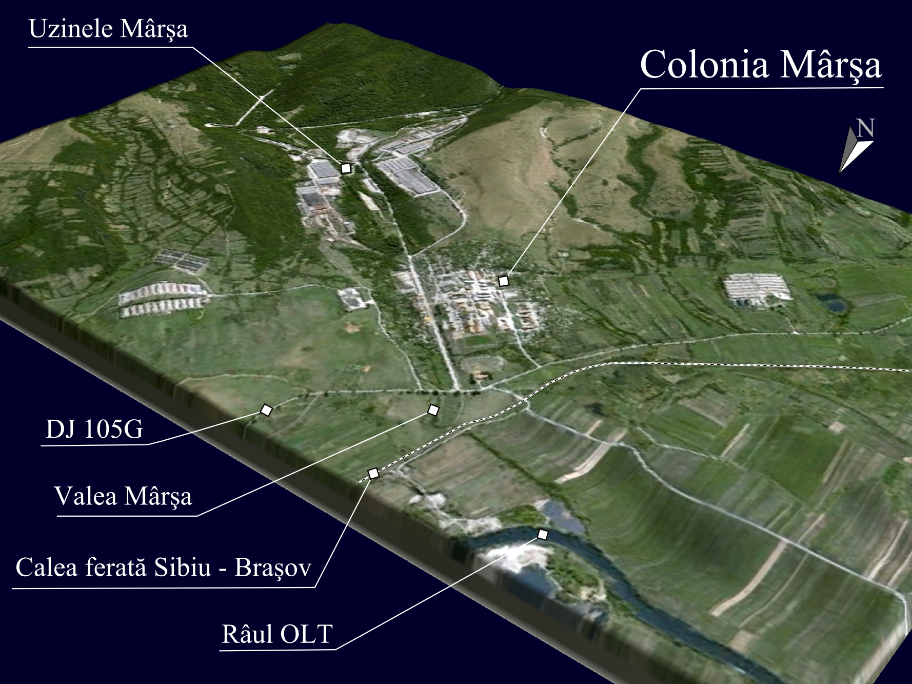 Prelucrare 3D pentru Mârşa, Sibiu. Imagine realizata cu date SRTM furnizate liber de NASA si textura World Imagery.